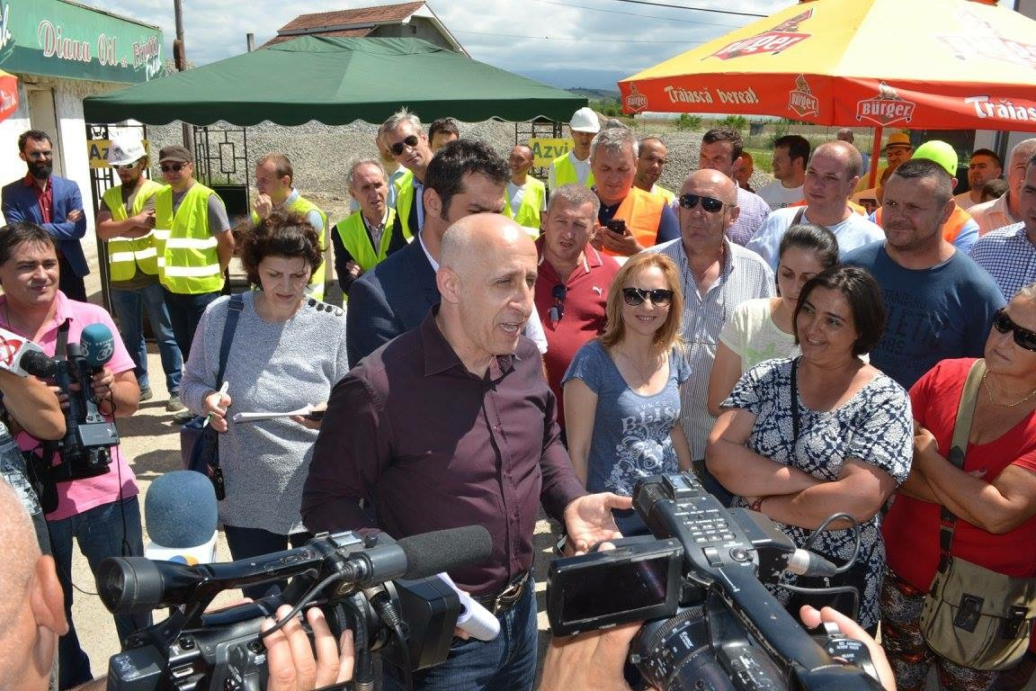 Vizita pe DN 76, după emiterea ordonanței de accelerare a investițiilor, deblocarea acestui șantier și a șantierelor de autostrăzi care nu mai aveau din 2015 autorizații de construire